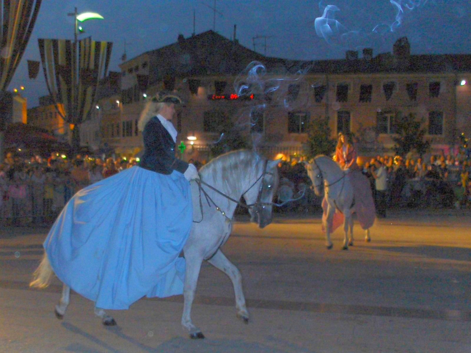 Poreč 2008 (Giostra)